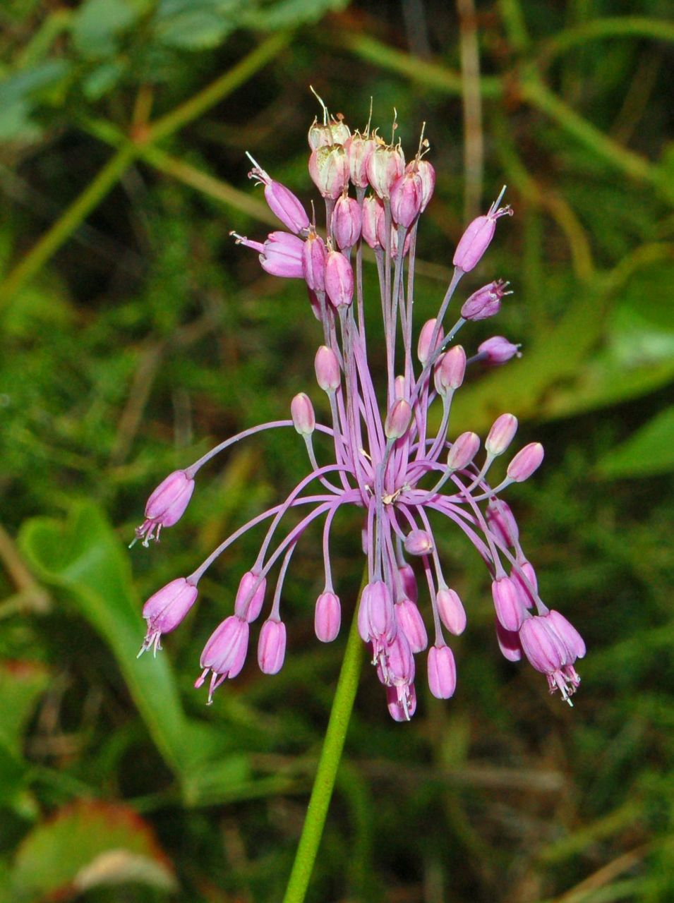 Iridaceae - Allium carinatum